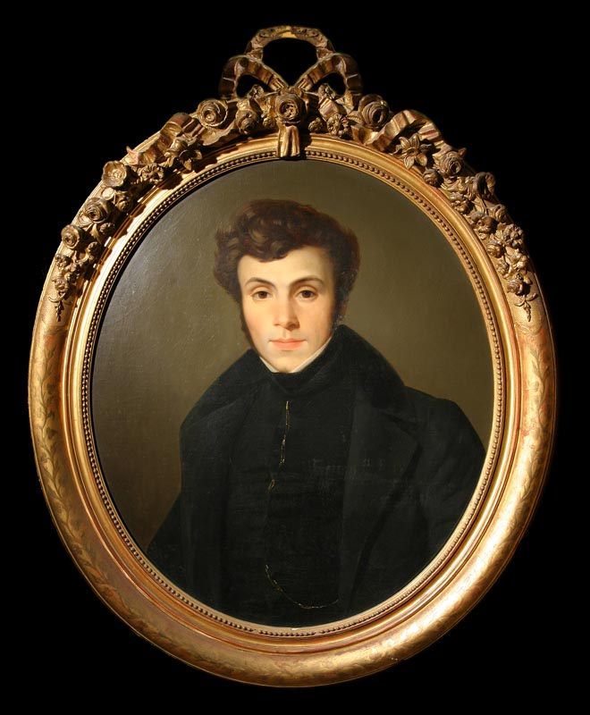 Portrait de Félix Davin (1807-1836) (French novellist, poet and journalist).